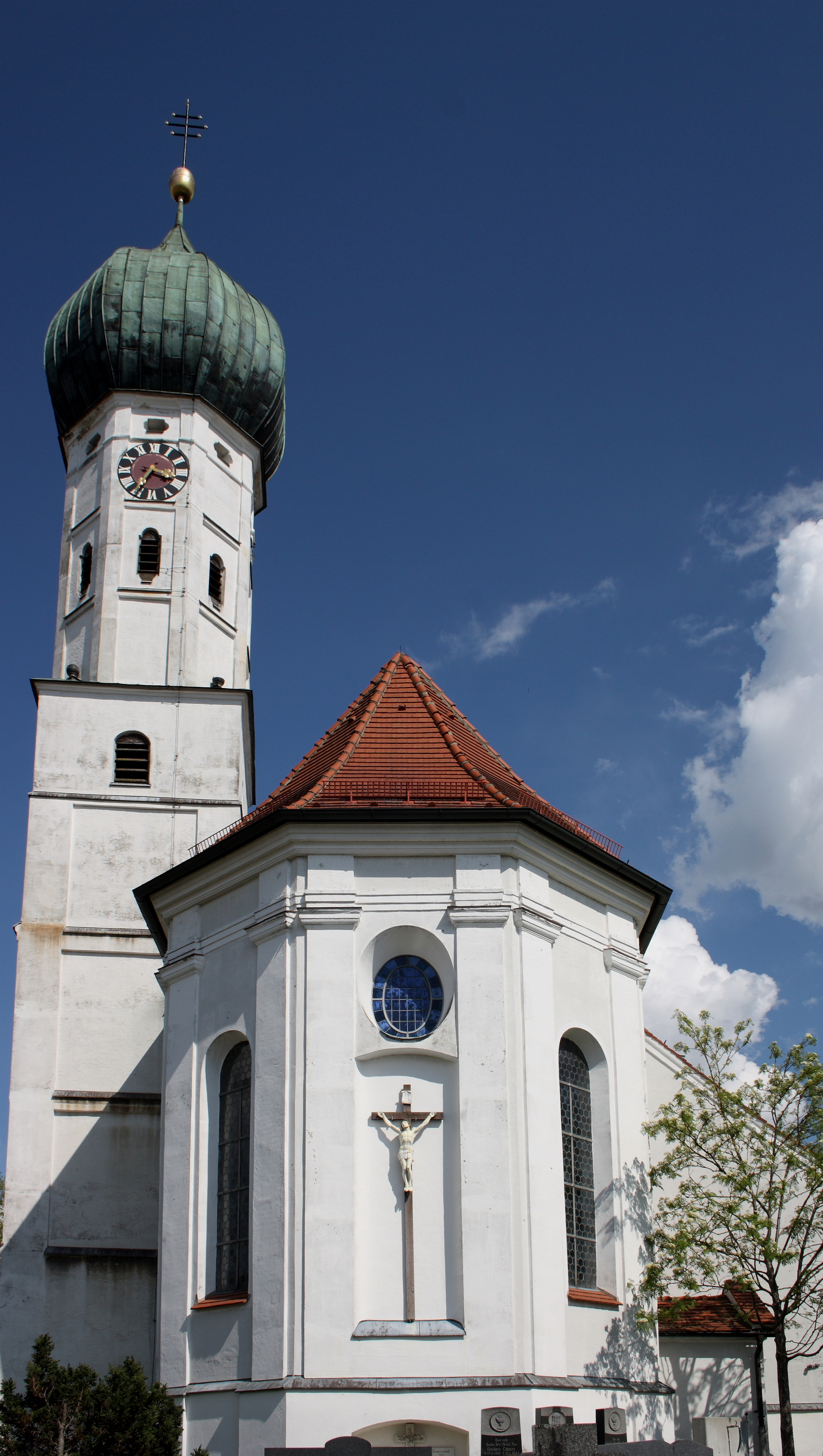 Katholische Pfarrkirche St. Vitus und Katharina in Rehling, einer Gemeinde im Landkreis Aichach-Friedberg (Bayern)